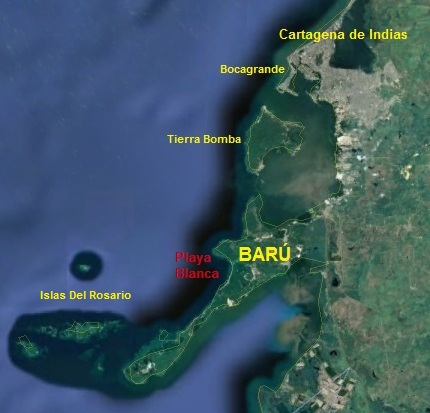 Ubicación de las Playas de Barú, en relación con Cartagena de Indias y las Islas del Rosario